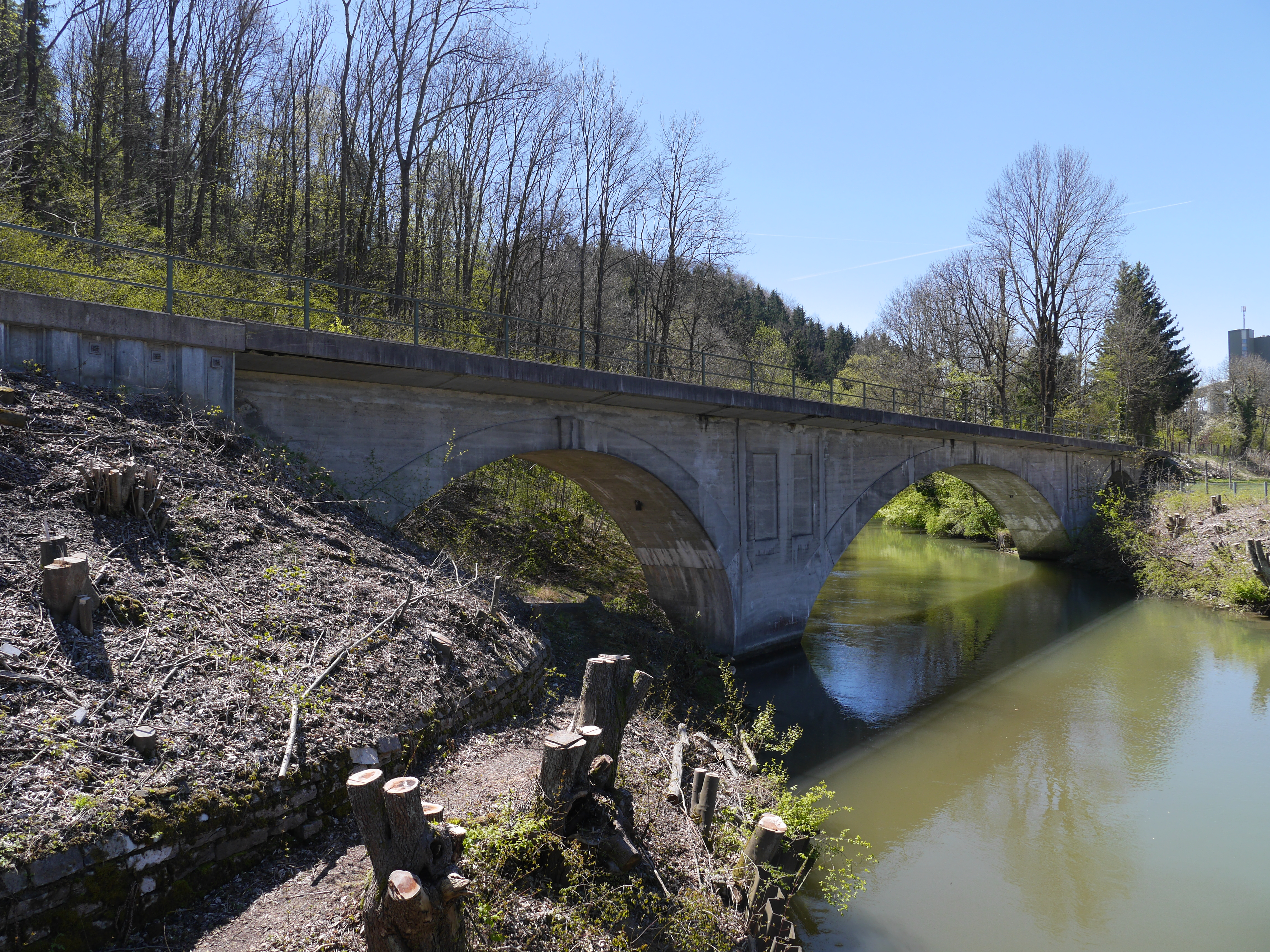 Brücke der Bahnstrecke Schongau–Peißenberg über den Lechkanal, östlich der Schongauer Papierfabrik